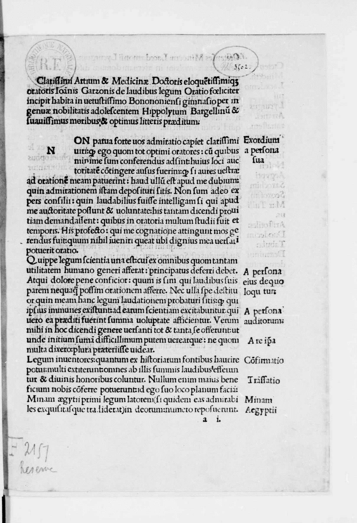 carta a1r